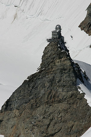 Jungfraujoch: Wetterstation Sphinx